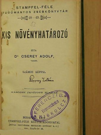 Cserey Adolf (1851-1919): Kis növényhatározó. Második kiadás. Stampfel-féle Könyvkiadóhivatal (Budapest), 1905.